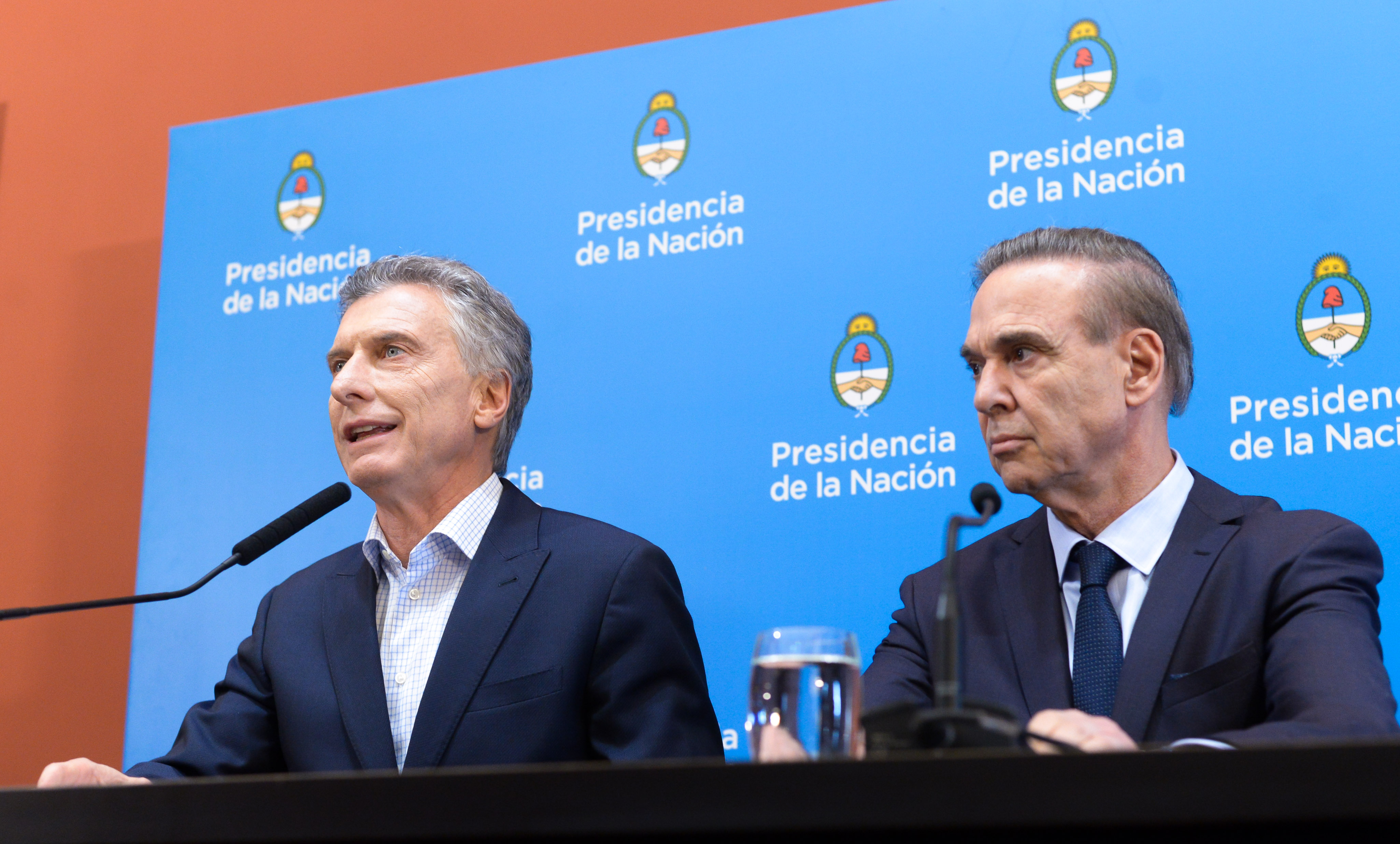 El Jefe del Estado se pronunció durante una conferencia de prensa que ofreció esta tarde en el Salón de los Pueblos Originarios de la Casa Rosada, junto al senador Miguel Pichetto, luego de encabezar una reunión de gabinete nacional.